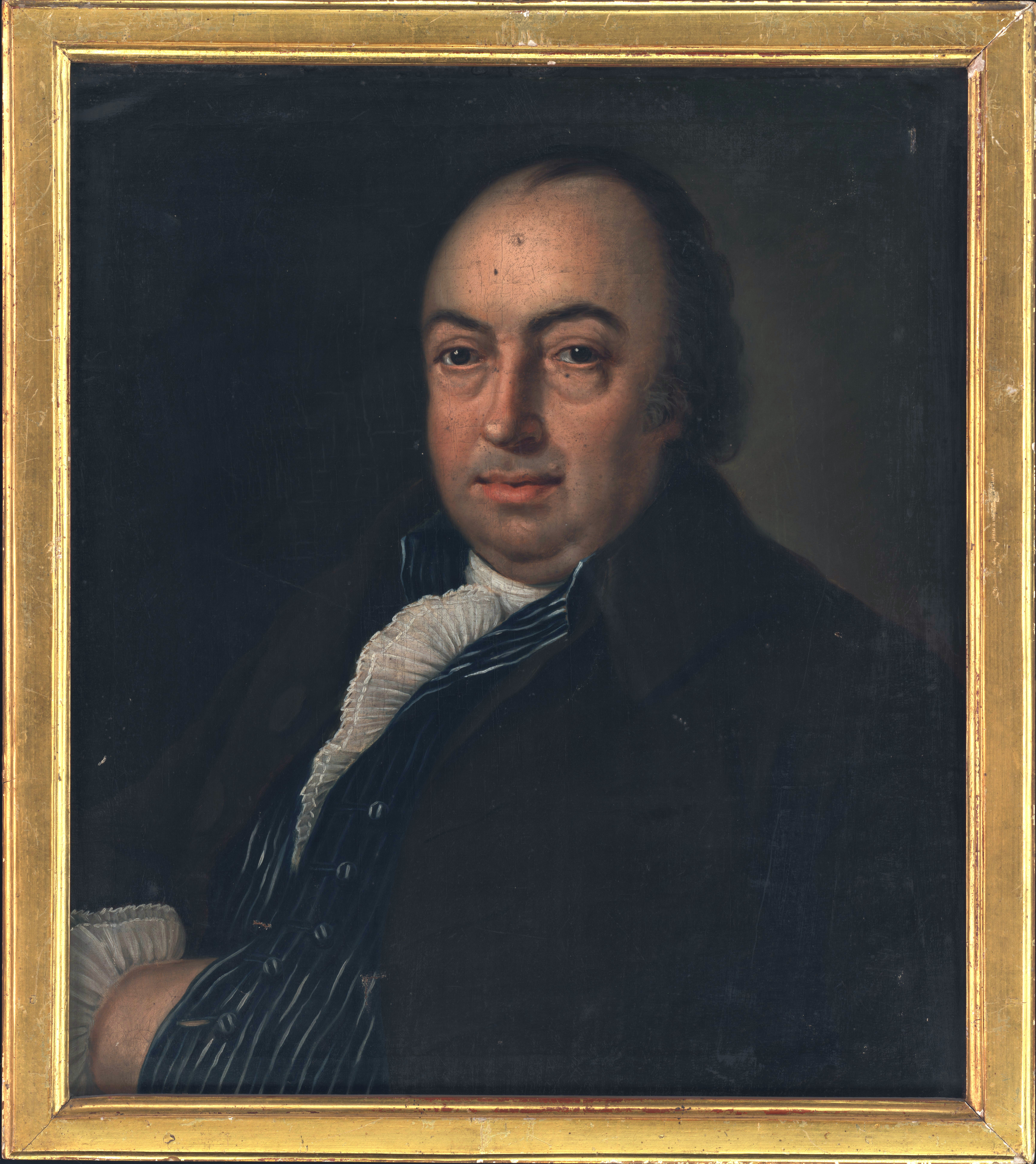 Brustbildnis von Jakob Zürcher, Ehemann von Anna Elisabetha Zürcher-Hirzel, Öl auf Leinwand, 58 x 50,5 cm